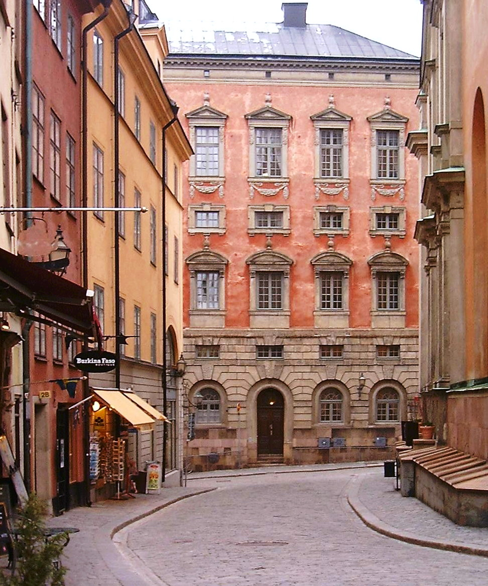 Façade of the Oxenstierna Palace at Storkyrkobrinken in Gamla stan, Stockholm.